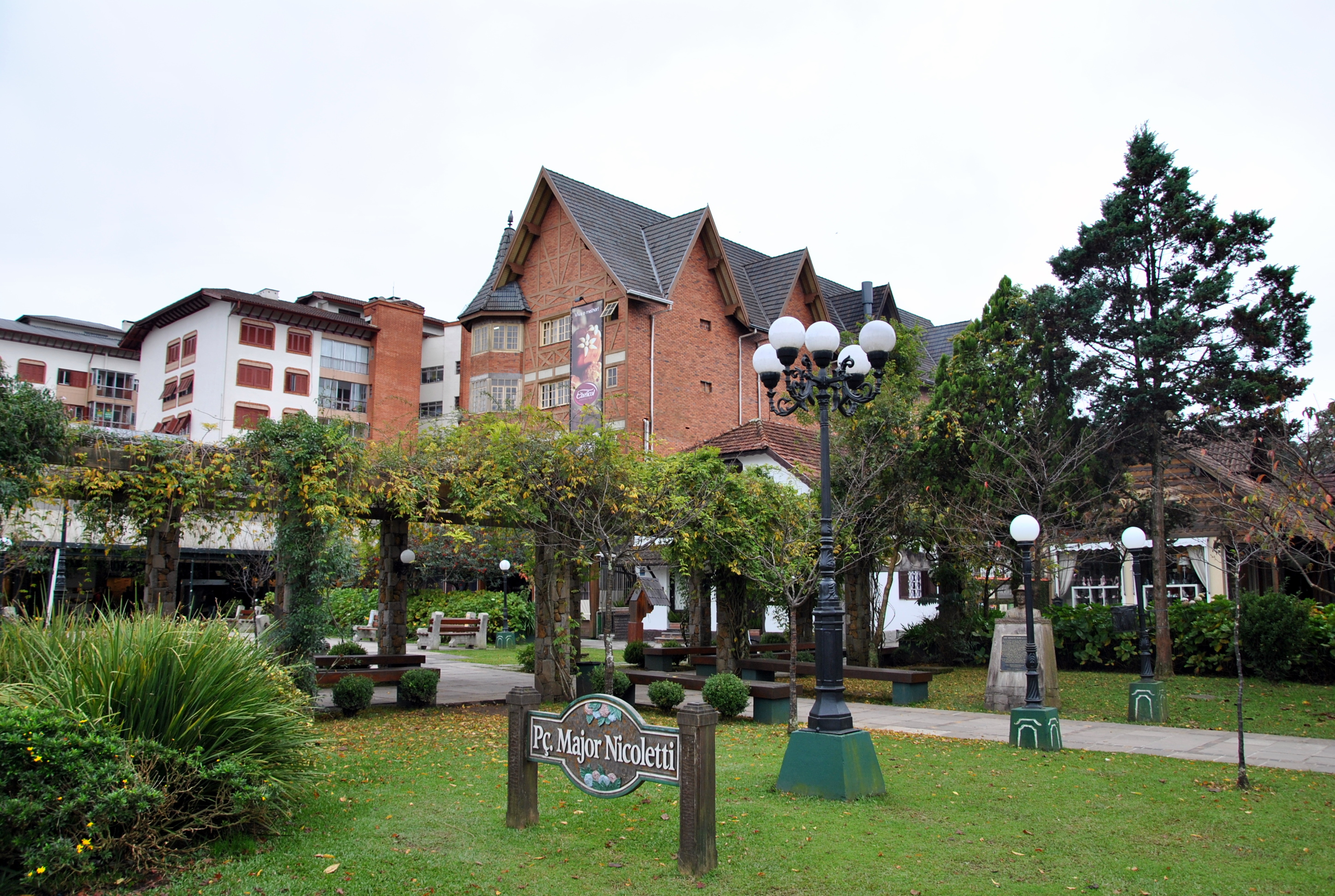 Gramado (RS), Brazil